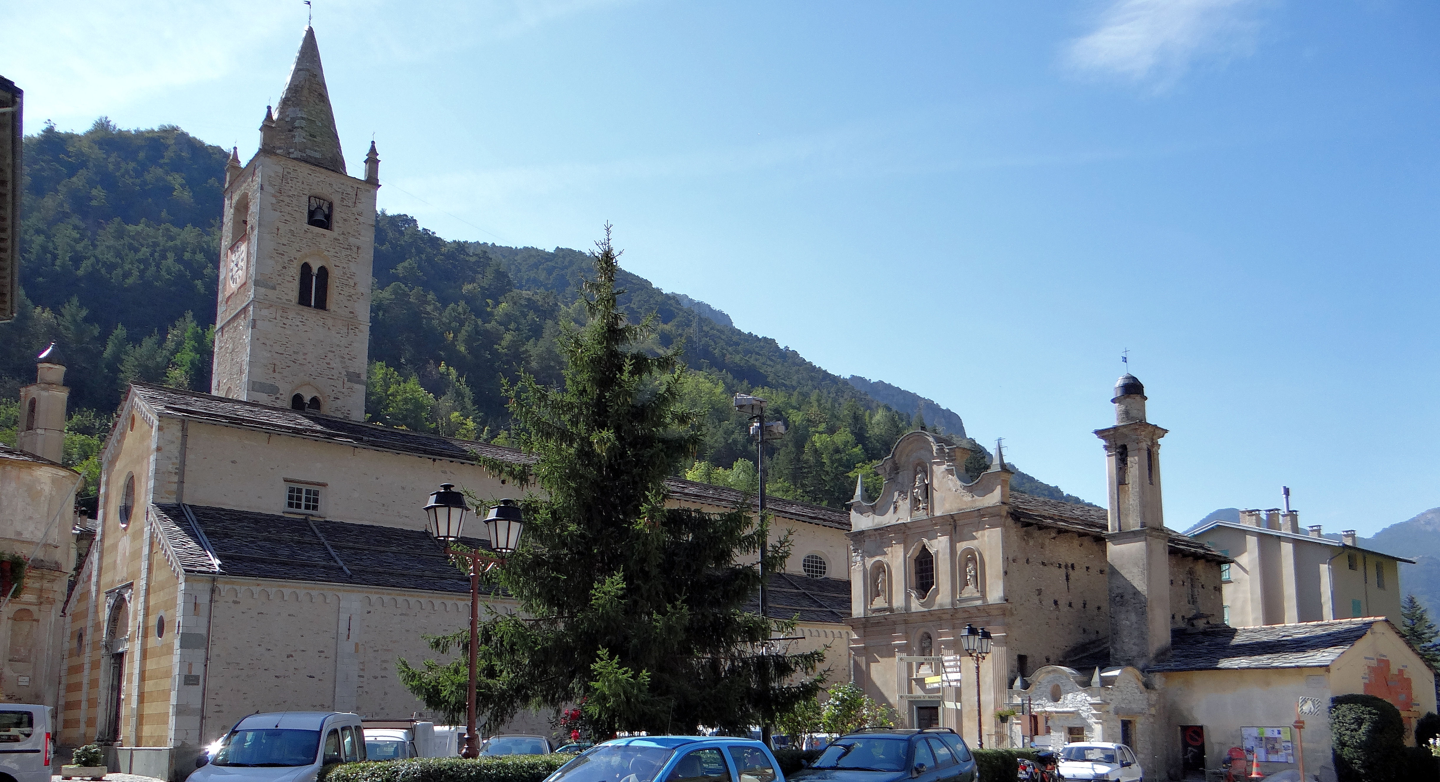 La Brigue - Chapelle de l'Assomption - La place Saint-Martin, le collégiale Saint-Martin et les deux chapelles de Pénitents blancs